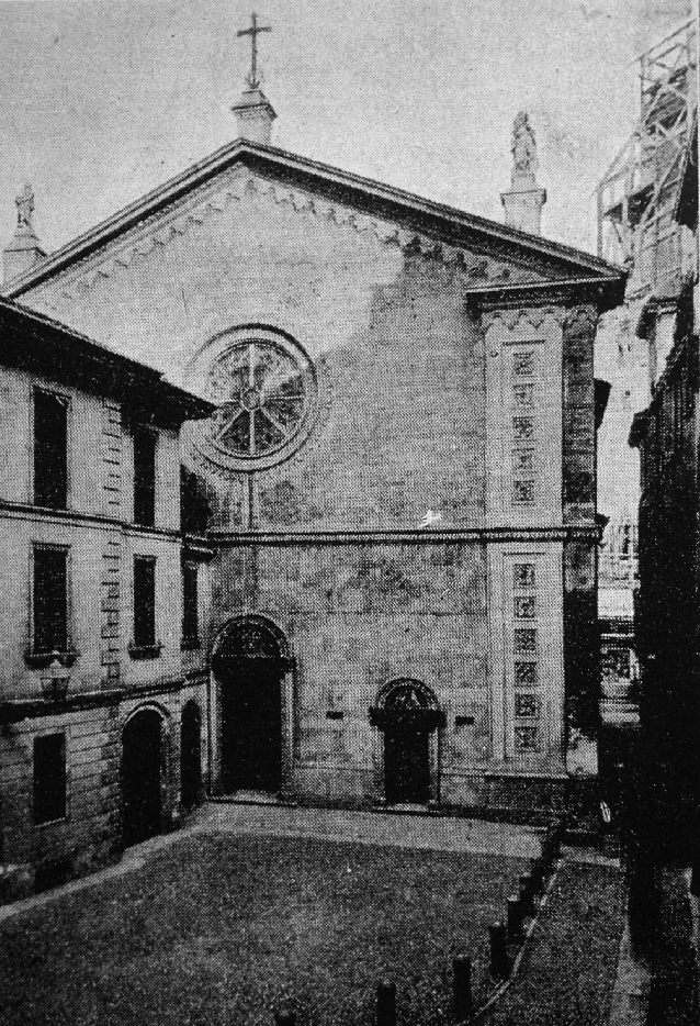 Chiesa di Santa Maria Beltrade a Milano. Posta nell'area dell'attuale piazza omonima, fu sconsacrata nel 1924 e abbattuta nel 1934.